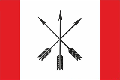 Прапор Чигирина